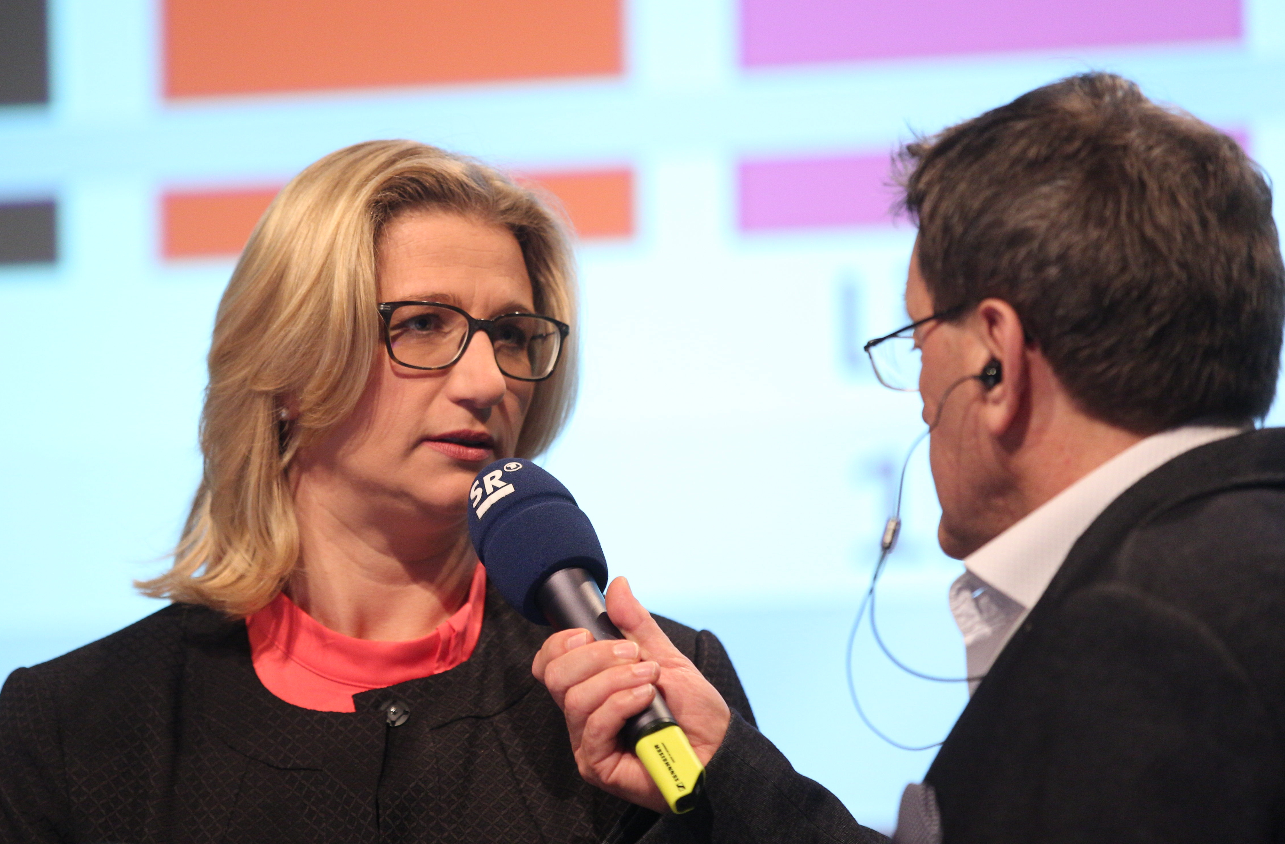 Anke Rehlinger (SPD) beim Wahlabend zur Landtagswahl im Saarland